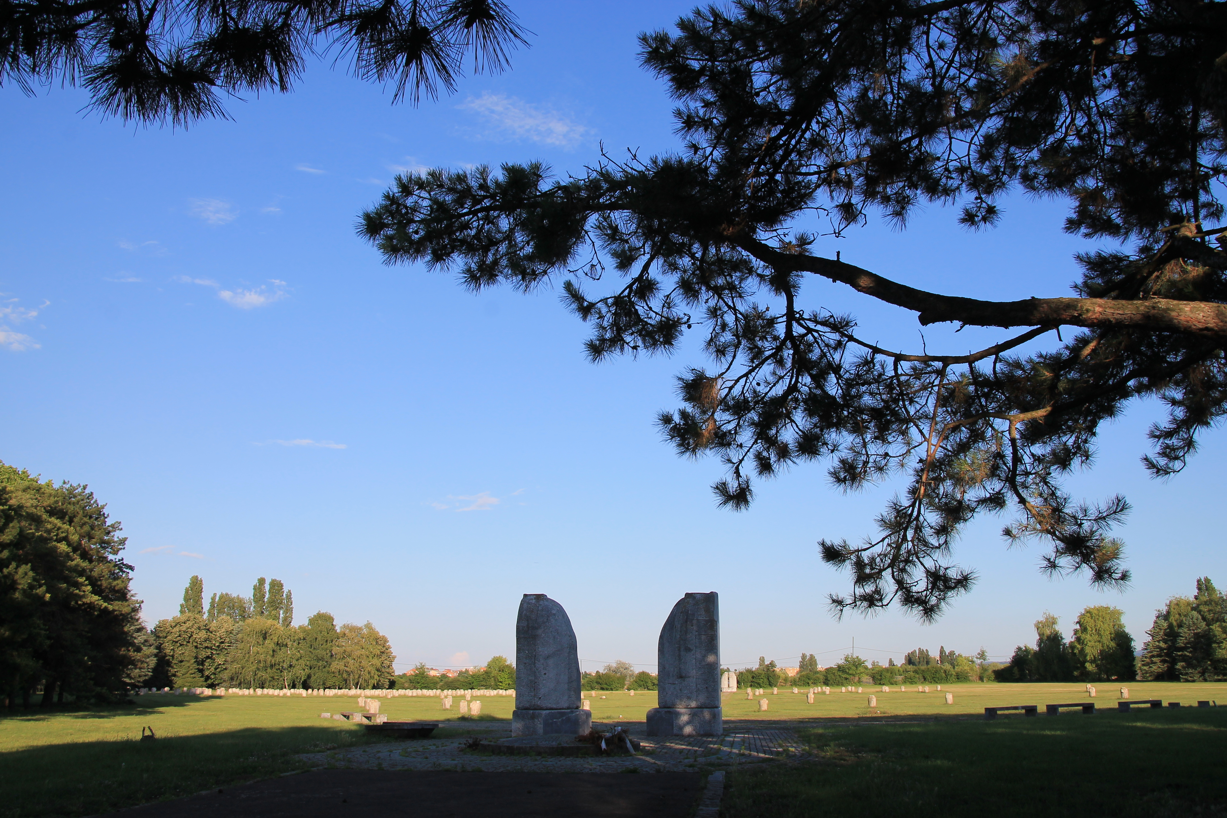 Spomen groblje NOR-a (Novi Sad)